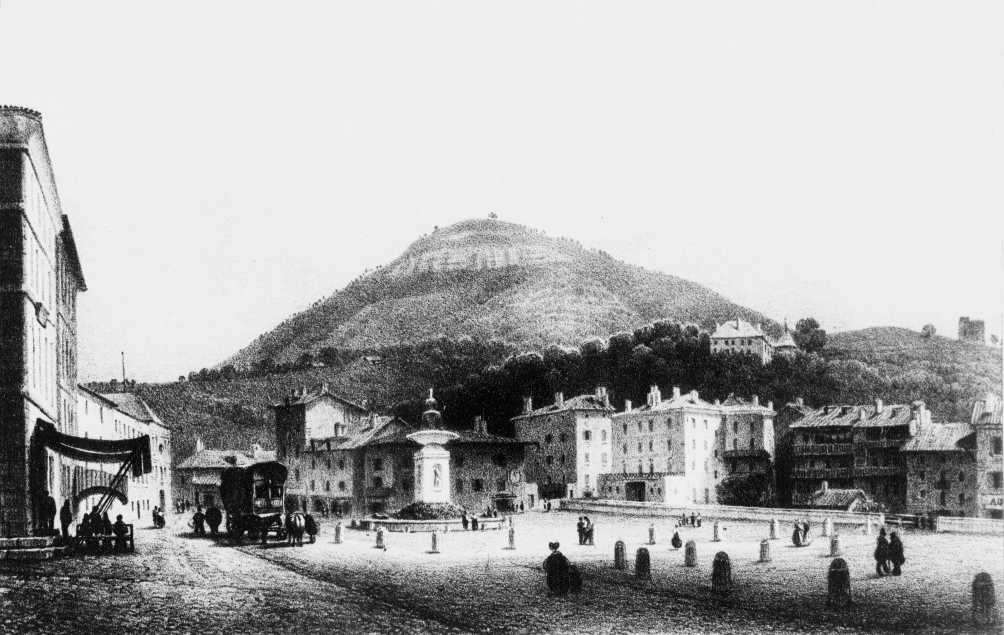 Voiron (Isère). Album du Dauphiné, ou Recueil de dessins représentant les sites les plus pittoresques du Dauphiné.